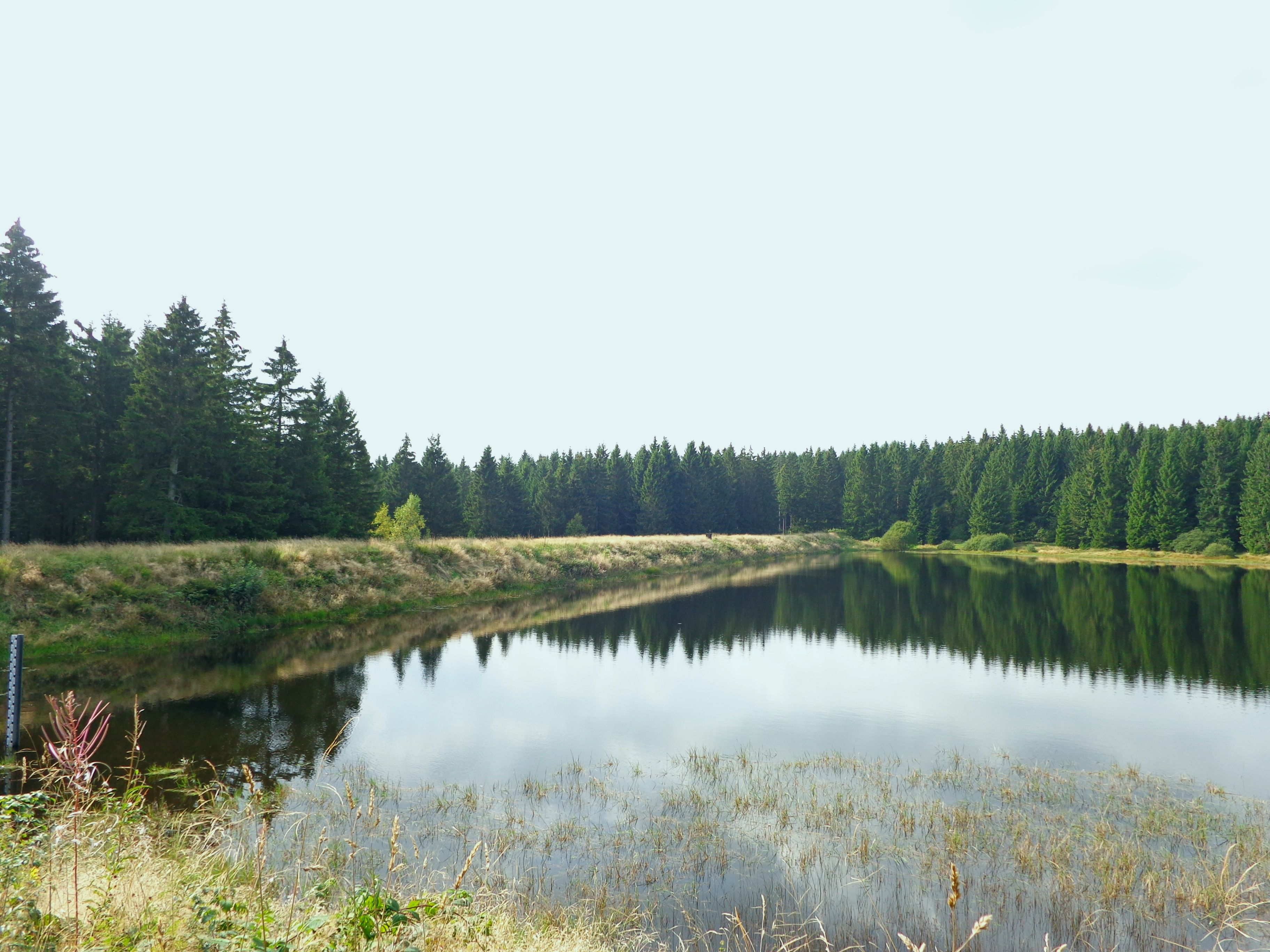 Zankwieser Teich des Oberharzer Wasserregals in der Nähe von Festenburg im Oberharz